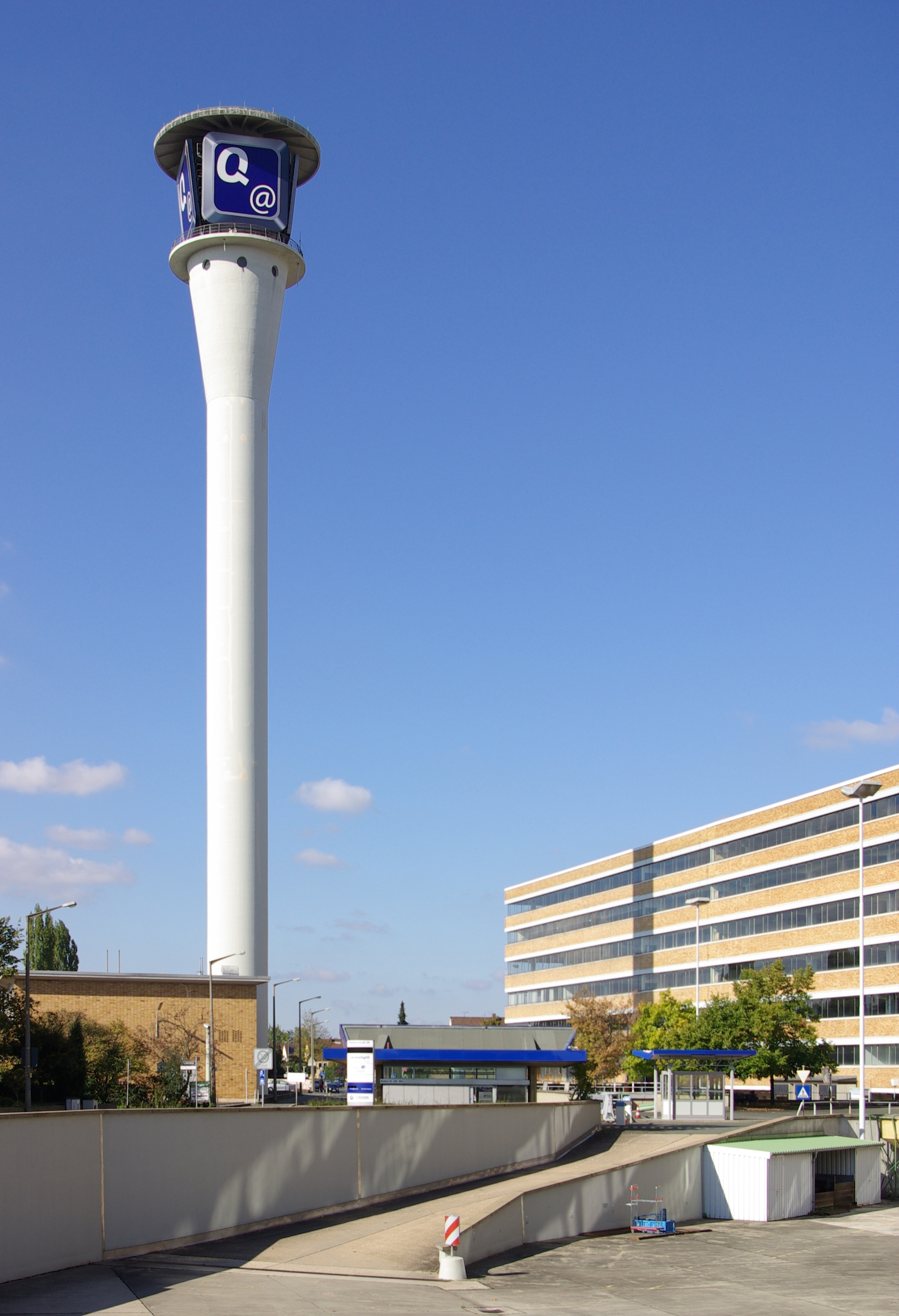 Quelleturm im Nürnberger Stadtteil Eberhardshof.